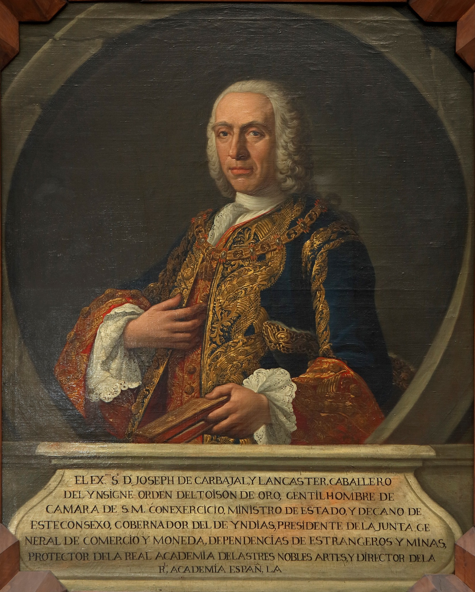 Retrato del politico español José de Carvajal y Lancaster (1698-1754), conservado en la Real Academia Española, ubicada en la ciudad de Madrid, (España).